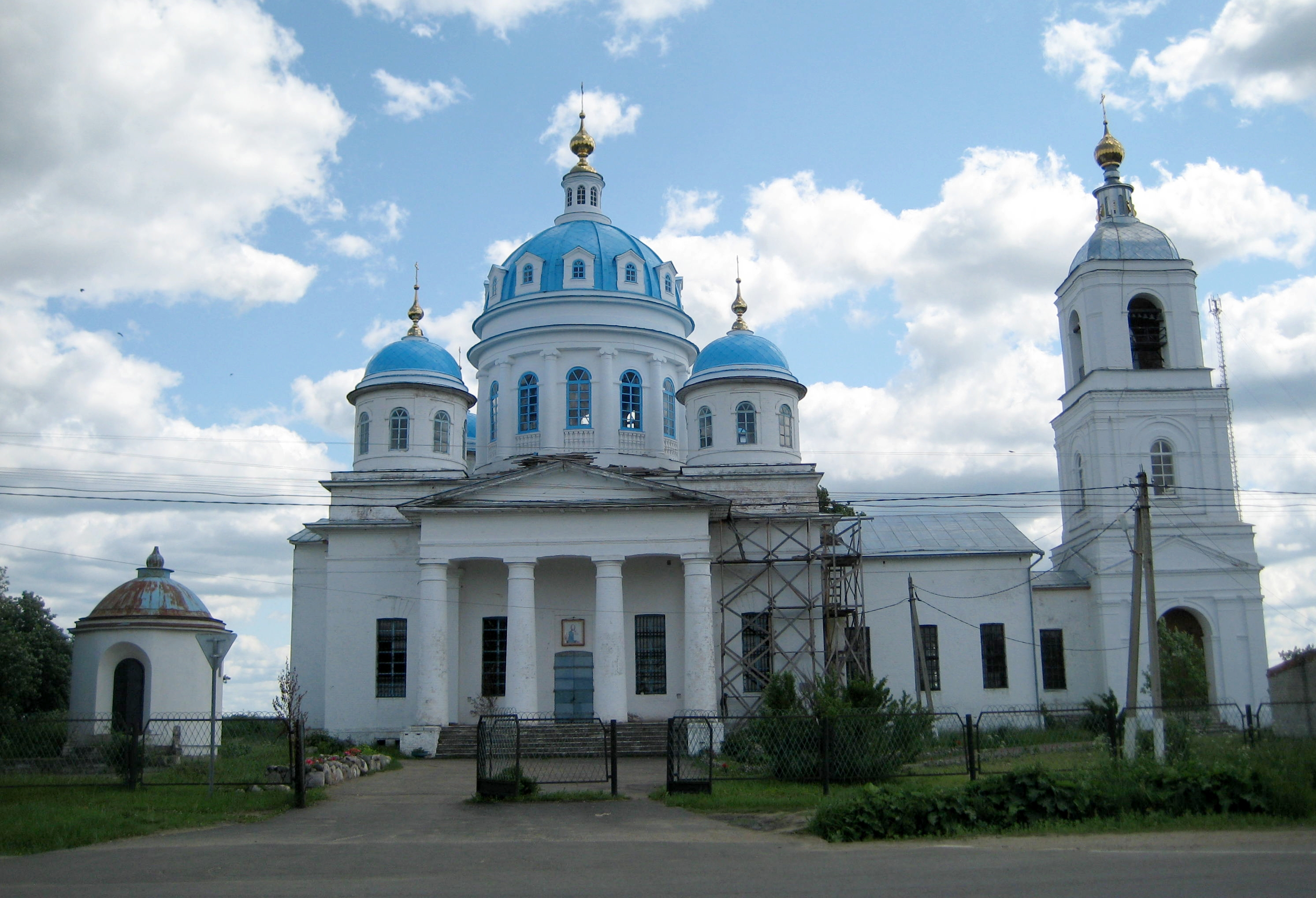 Духовская церковь в селе Новое Переславского района Ярославской области